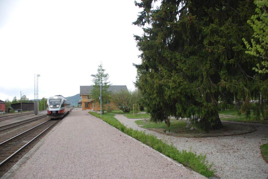 Stasjonsparken på Koppang stasjon